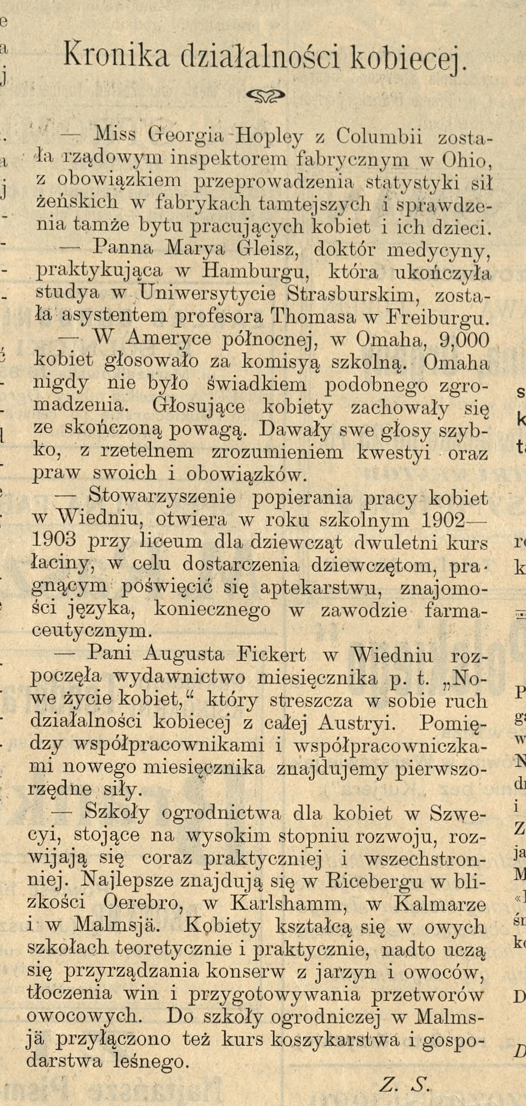 Kronika działalności kobiecej, dział prowadzony przez Zofię Seidler (podpisywany kryptonimem „Z.S.”), wycinek z czasopisma „Bluszcz” 1902 (nr 10)